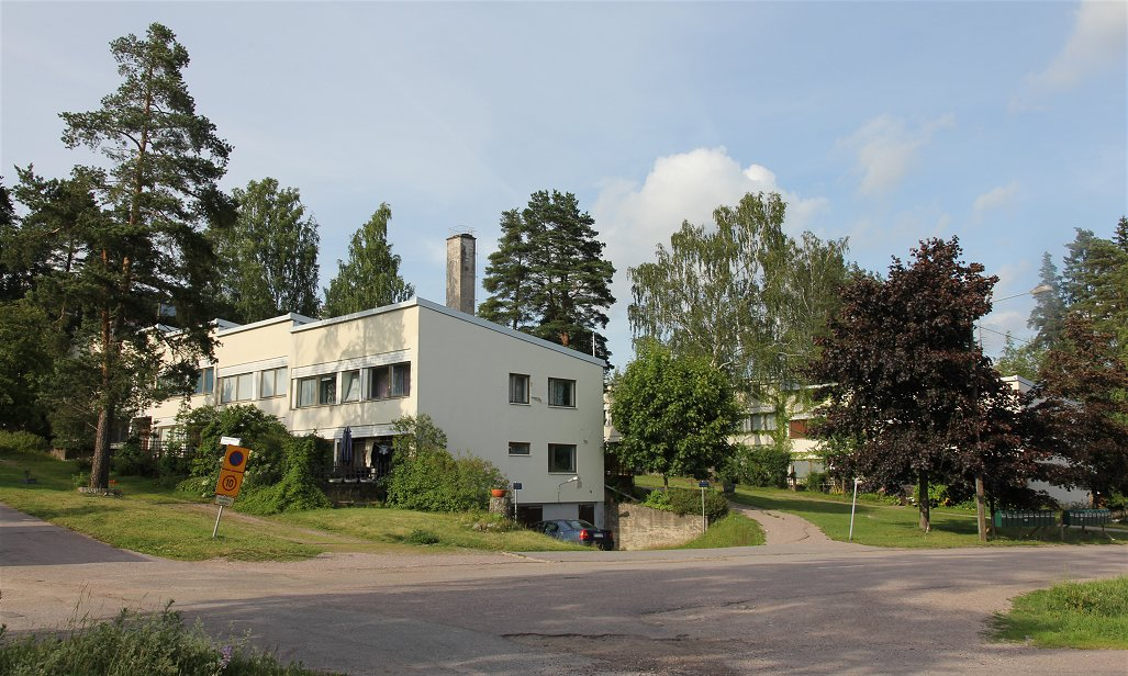 Arkkitehti Alvar Aallon Aerola -rivitaloja (1953–1955) Vantaan Veromiehen kaupunginosassa.